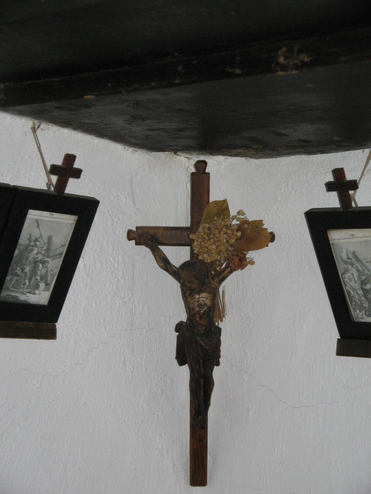 Herrgottswinkel Quelle: eigene Aufnahme 19 08 2005 Fotograf: Janez Novak, Ljubljana, Slovenija